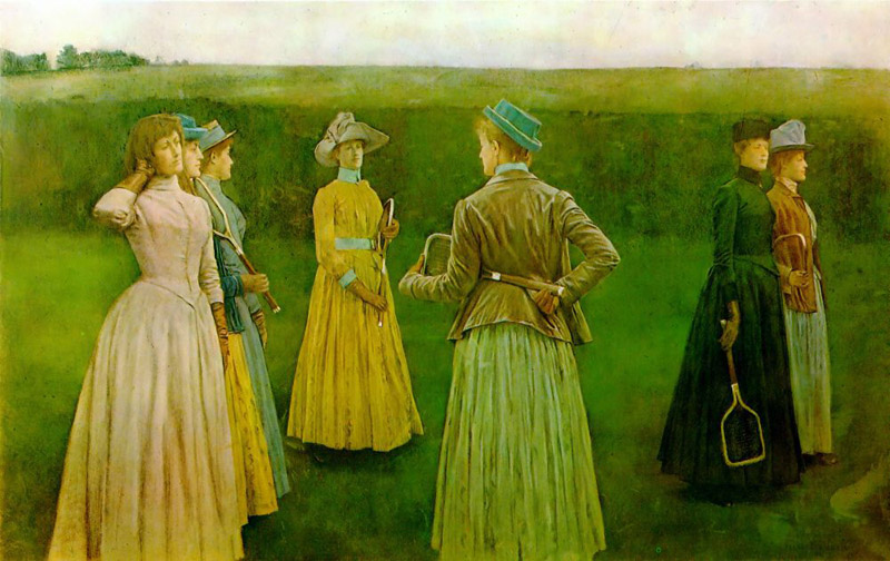 "Memories"